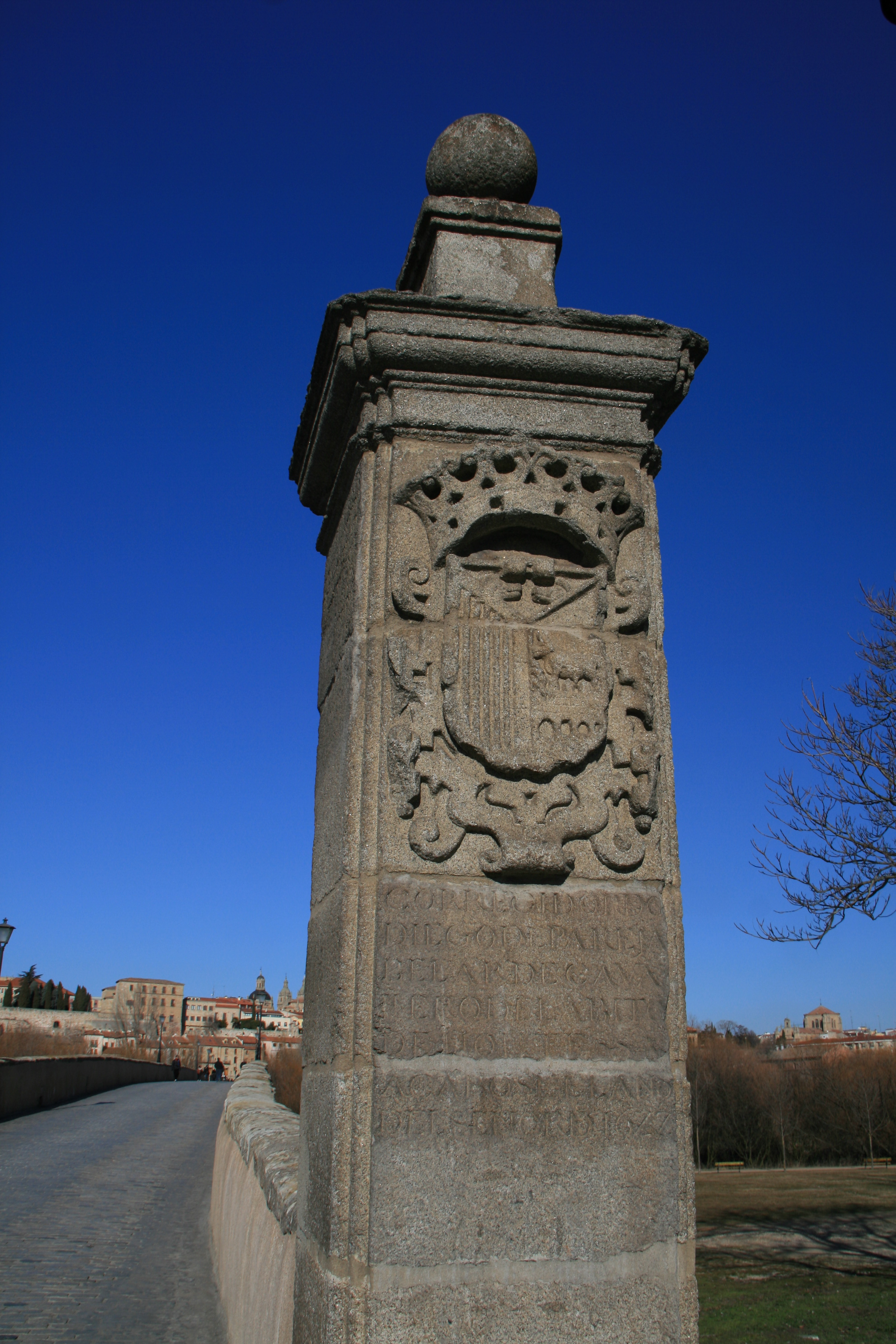 Mojón en la entrada del puente romano